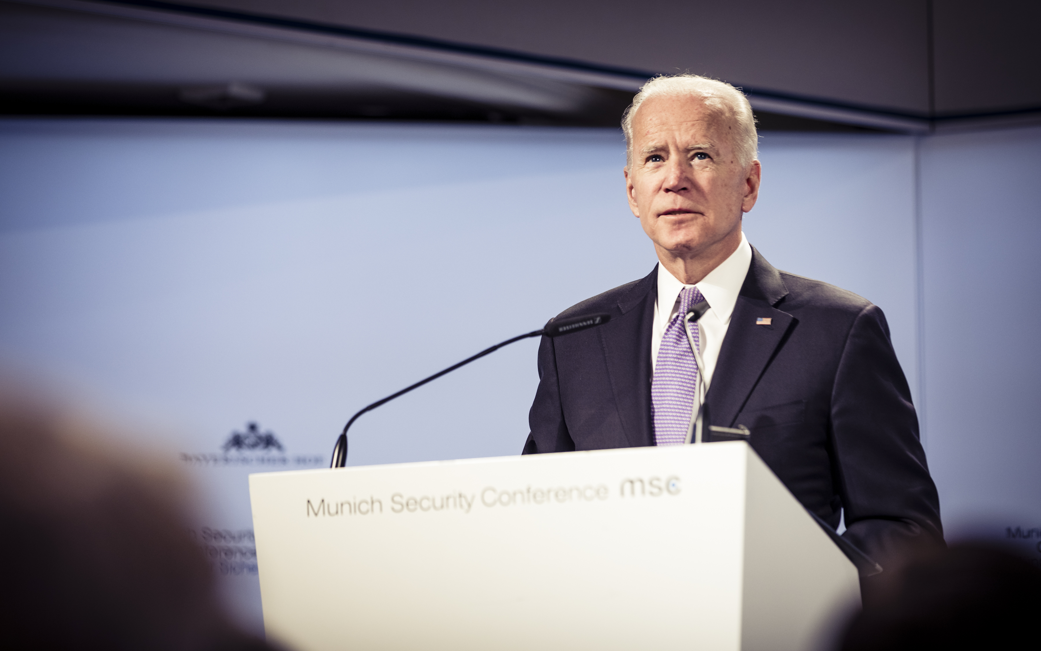 Joseph R. Biden Jr. während der Münchener Sicherheitskonferenz 2019